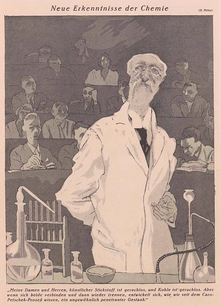 abfotografiert Simplicissimus, 18.09.1932 Jg. 37, Heft 25, Seite 300